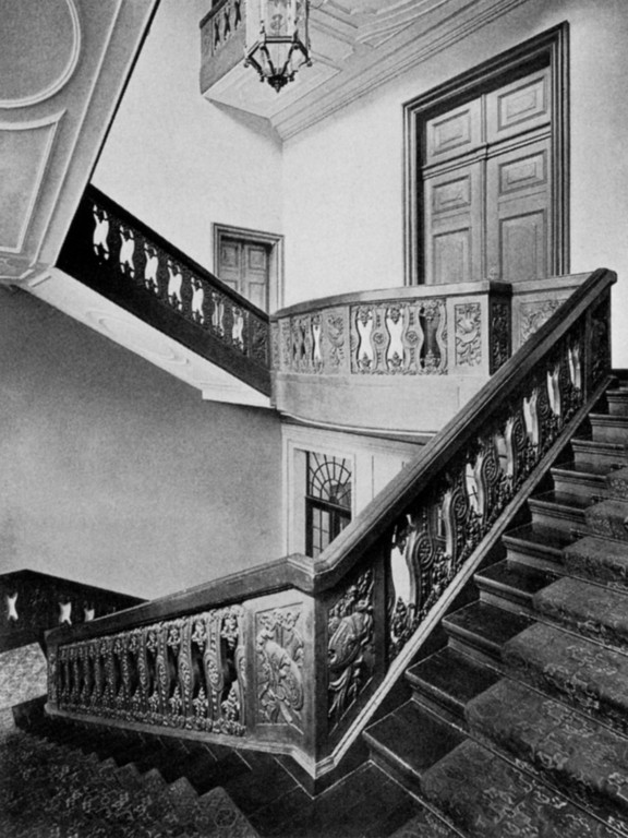 Treppenaufgang des zerstörten Palais von Kreutz, Berlin-Mitte, Klosterstraße 1936, nach vorgefundener Zitation 1910 aufgenommen, ein Urheber war nicht ermitteln, Bild älter als siebzig Jahre